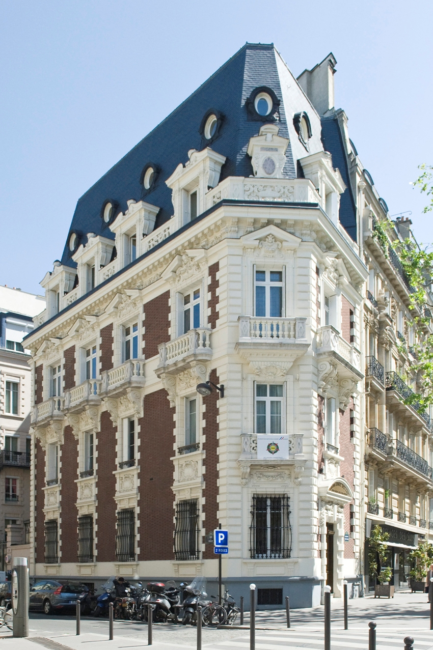 24 bis boulevard Saint-Germain 75005 Paris